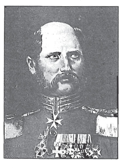 Portrait von Maximilian Theodor von Schlegel (1809–1863), preußischer Generalmajor